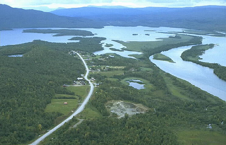 Motiv: Laisholm Nyckelord: Flygbilder, Riksintressen Kategori: Fjällbygd Laisholm